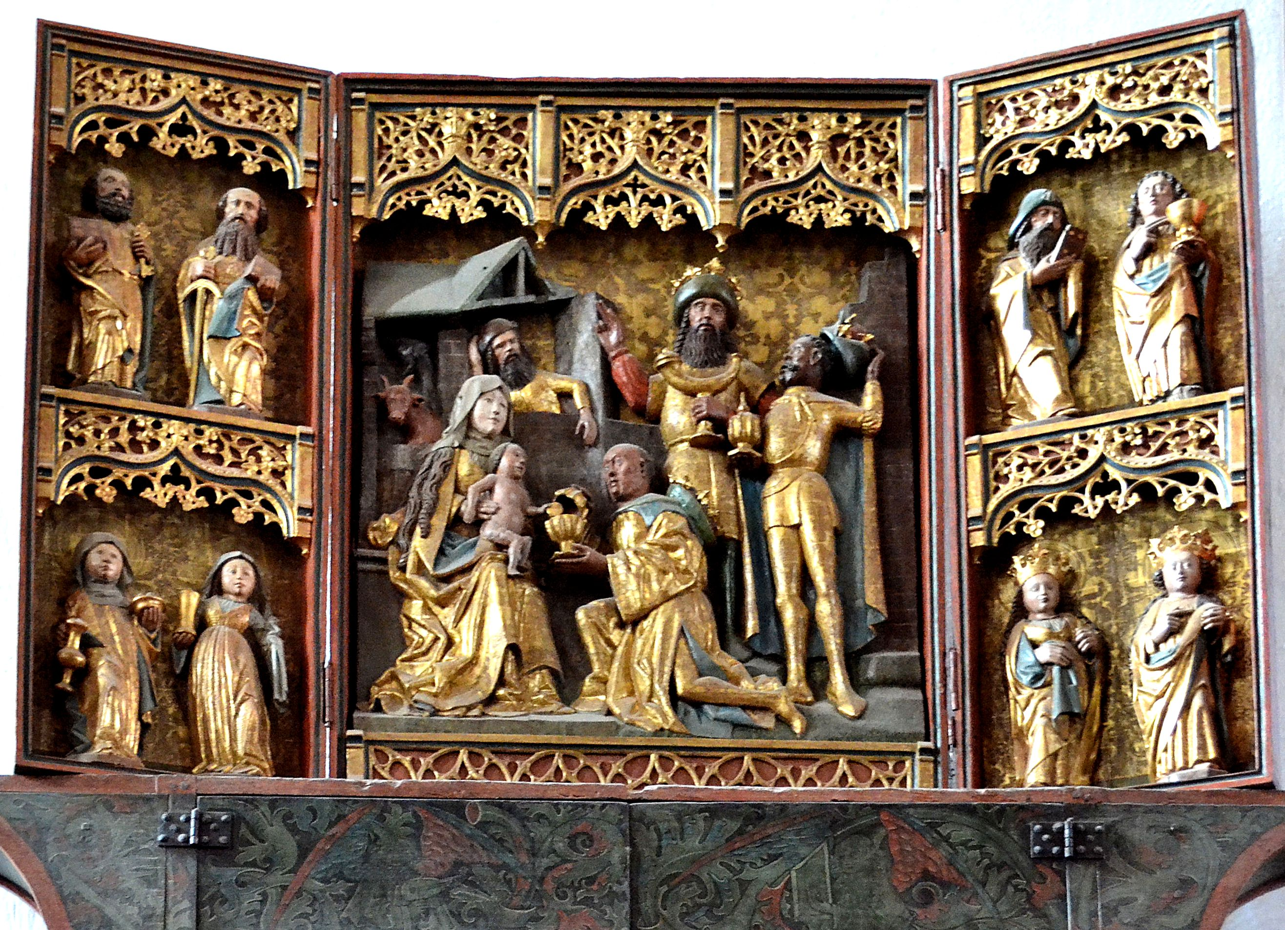 Ołtarz "Pokłon trzech króli" w katedrze w Kołobrzegu